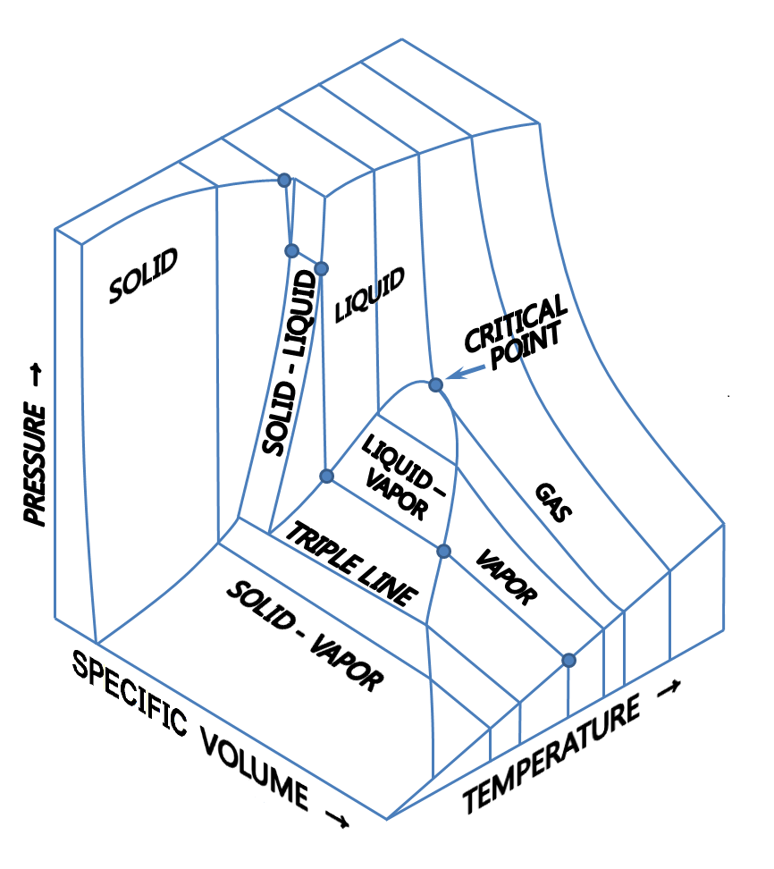 p-v-T 3D diagram for a generic pure material where p=pressure, v=specific volume, T=temperature